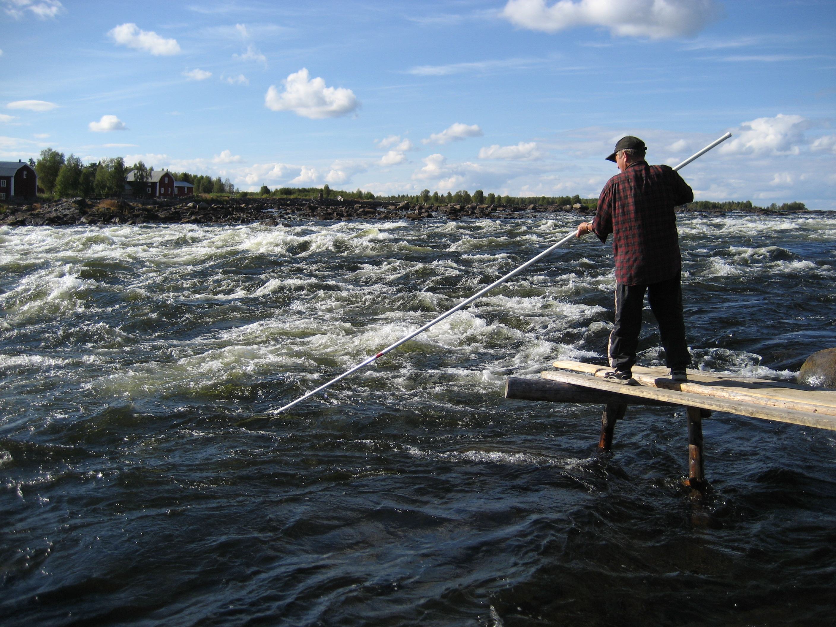 Lippoaja Kukkolankoskella Torniossa.